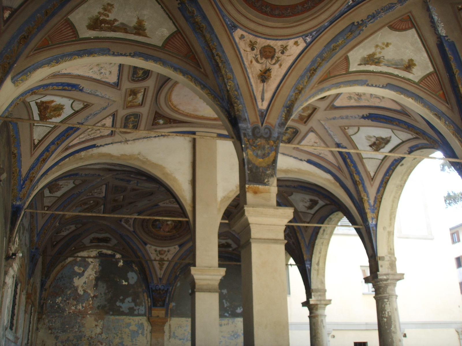 Palazzo_caccini loggetta in Florence